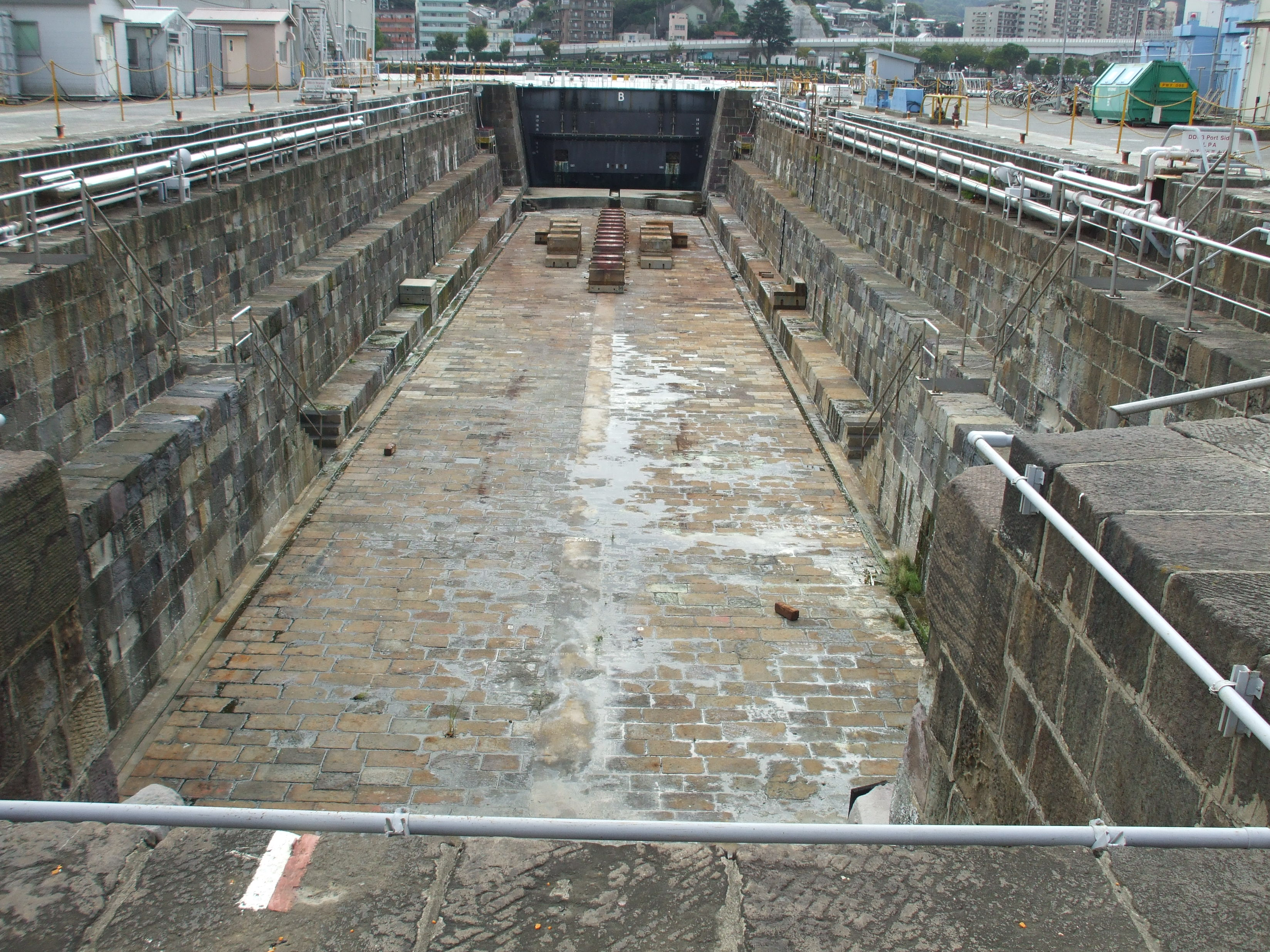 横須賀海軍施設三号ドック。